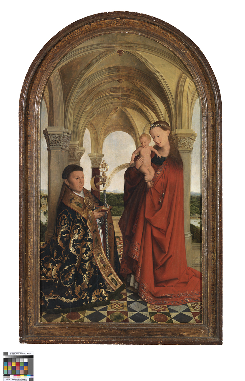 Madonna met Petrus Wijts (Anonieme meester, 17de eeuw, na 1615 - 1650); collection: Musea Brugge - Groeningemuseum